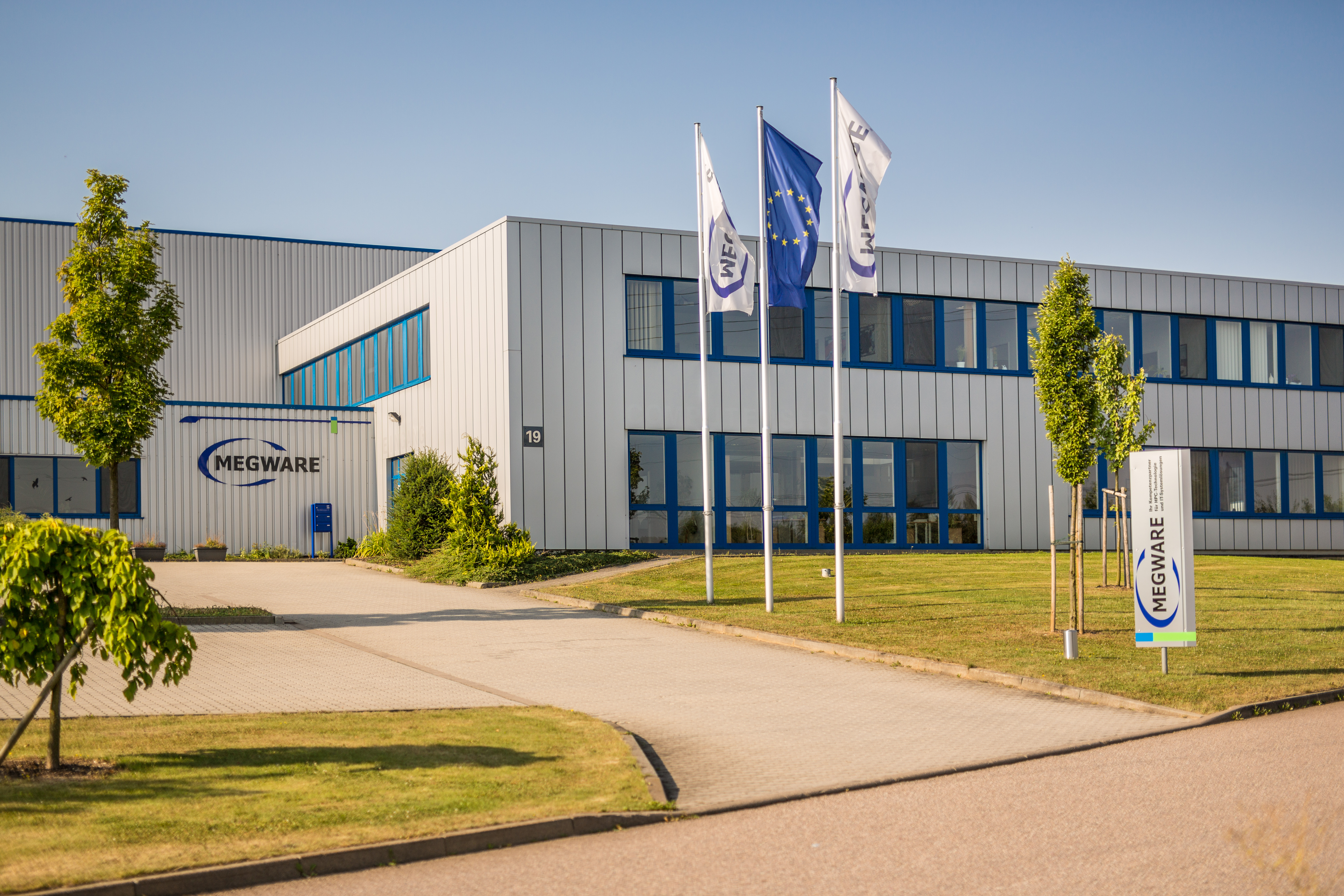 Zentrale der Megware Computer GmbH in Chemnitz-Röhrsdorf seit 1997